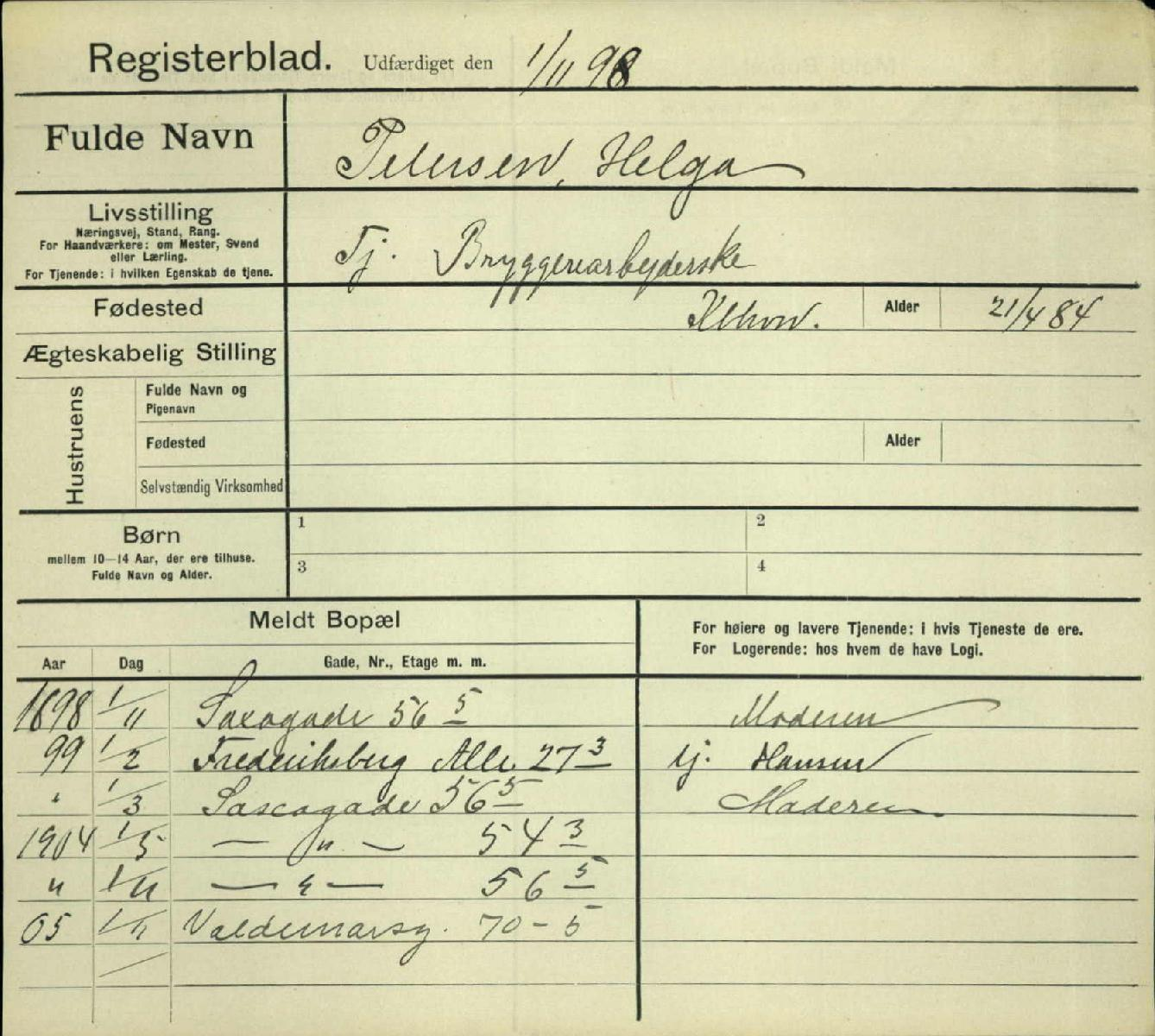 Registerblad for Helga Larsen